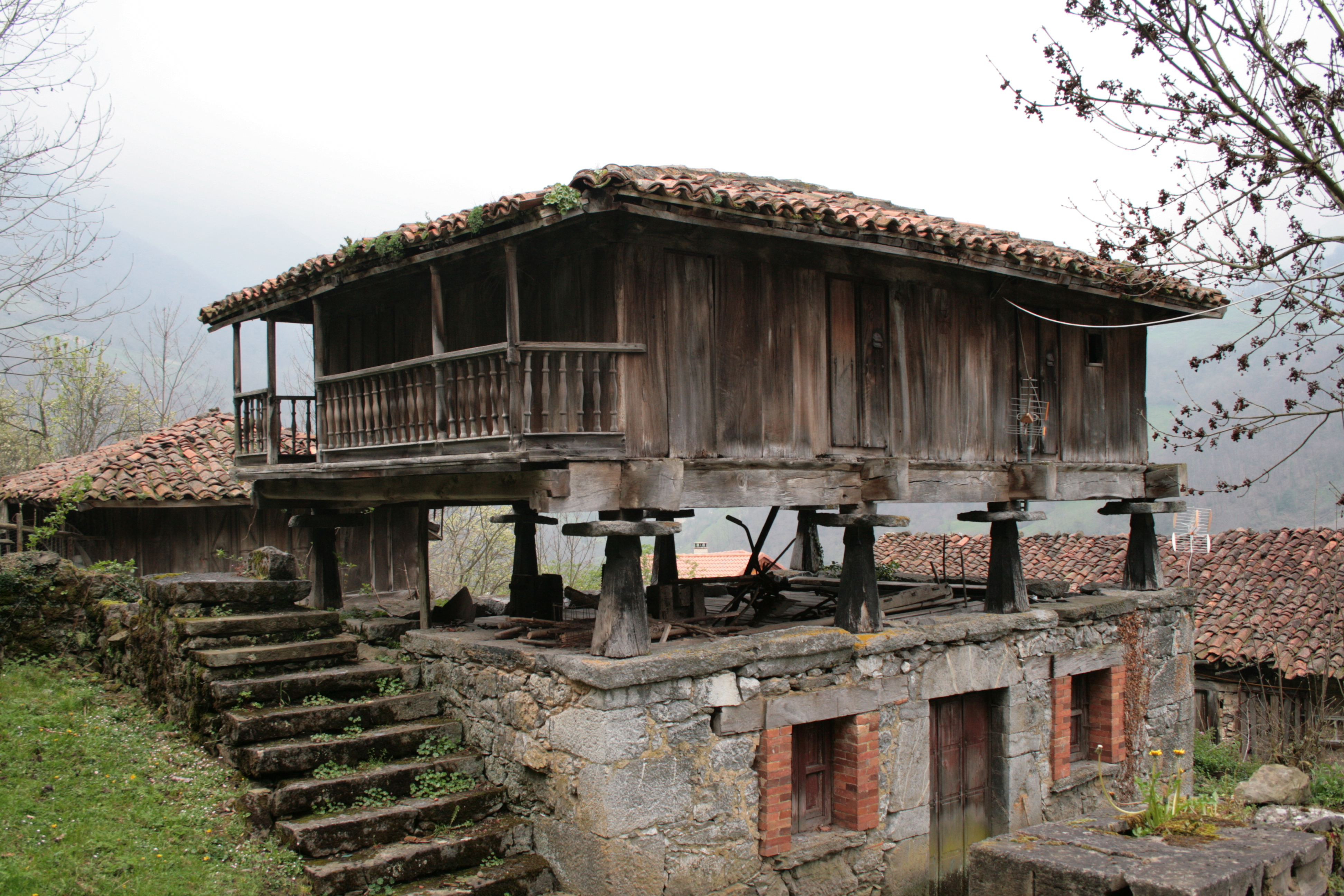 Horreo en Pola de Lena - Asturias